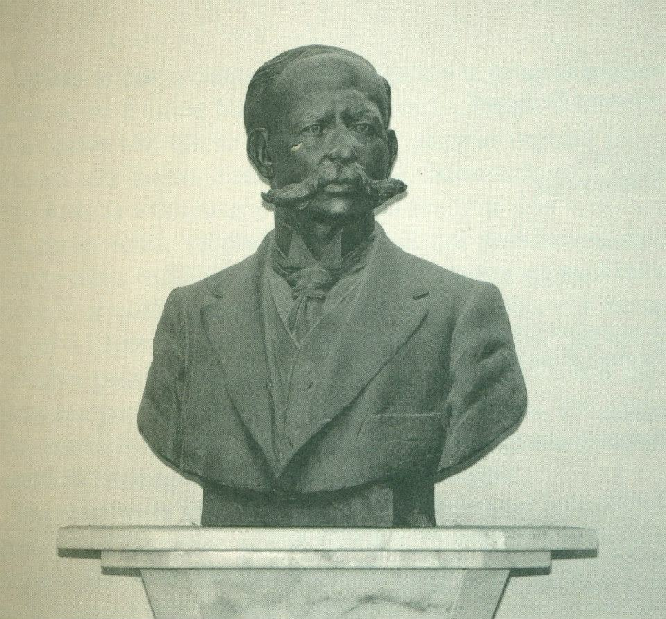 Busto del conte Napoleone Bertoglio Pisani conservato oggi presso il municipio del comune di Besate (MI) - Italia